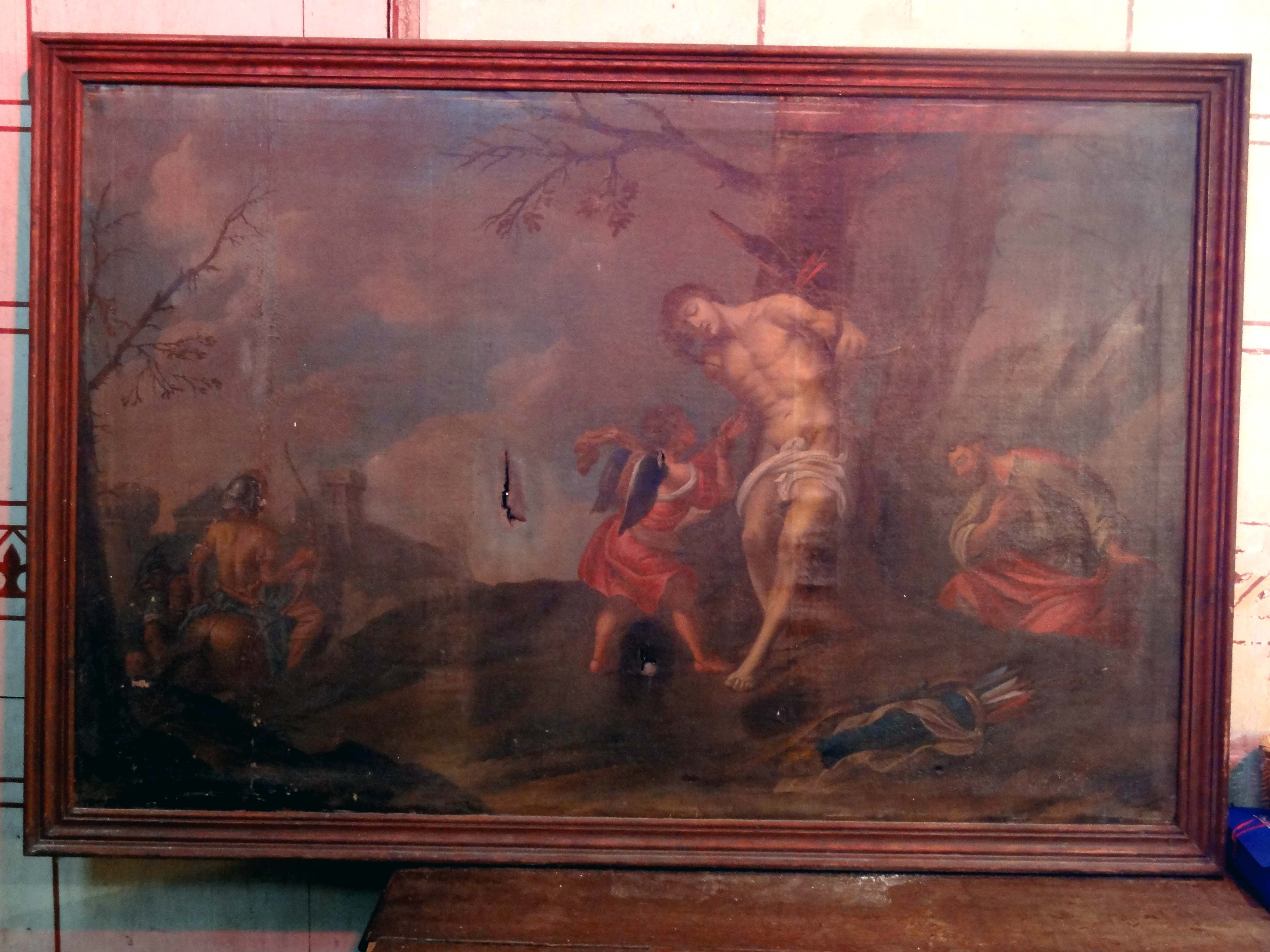 Mobilier de l'église (voir titre).